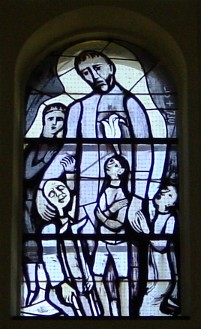 eines der 32 Kirchenfenster in der Pfarrkirche Liesing (Wien23) gestaltet von Martin Häusle, hl. Vitalis von Salzburg selbst fotografiert Erstellungssatum: März 2007